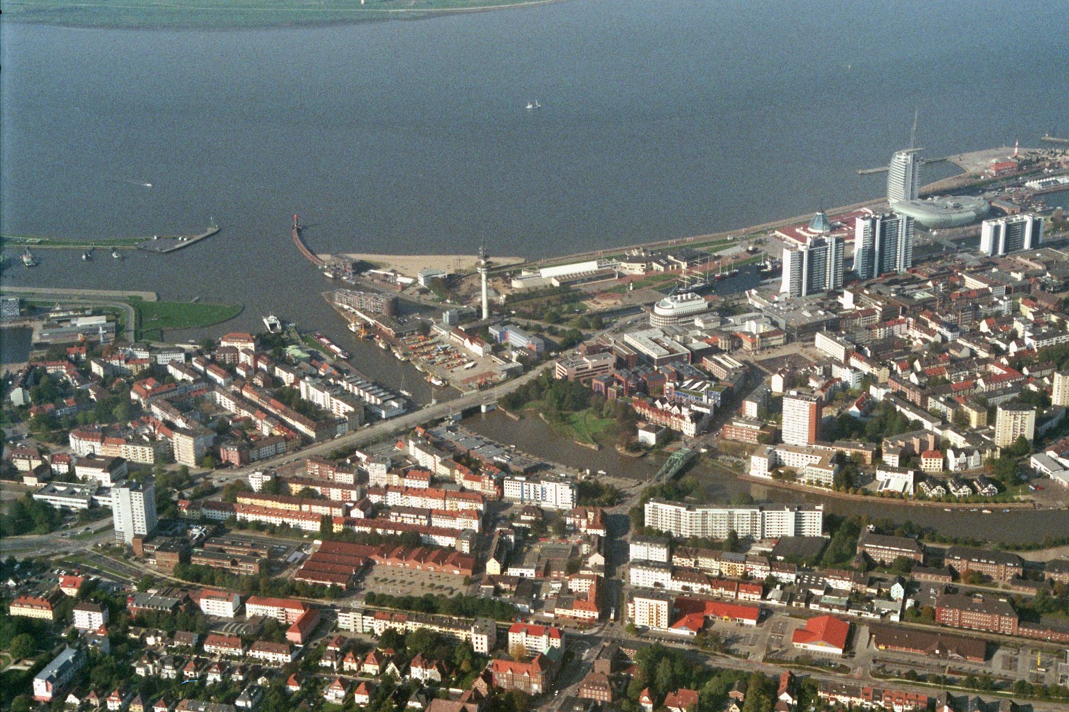 Letzter Abschnitt der Geeste in Bremerhaven